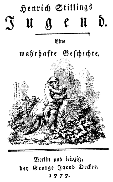 Schmutztitel der Erstausgabe von Johann Heinrich Jung-Stilling: Henrich Stillings Jugend, erster Teil des Autobiografischen Werks des Autors.